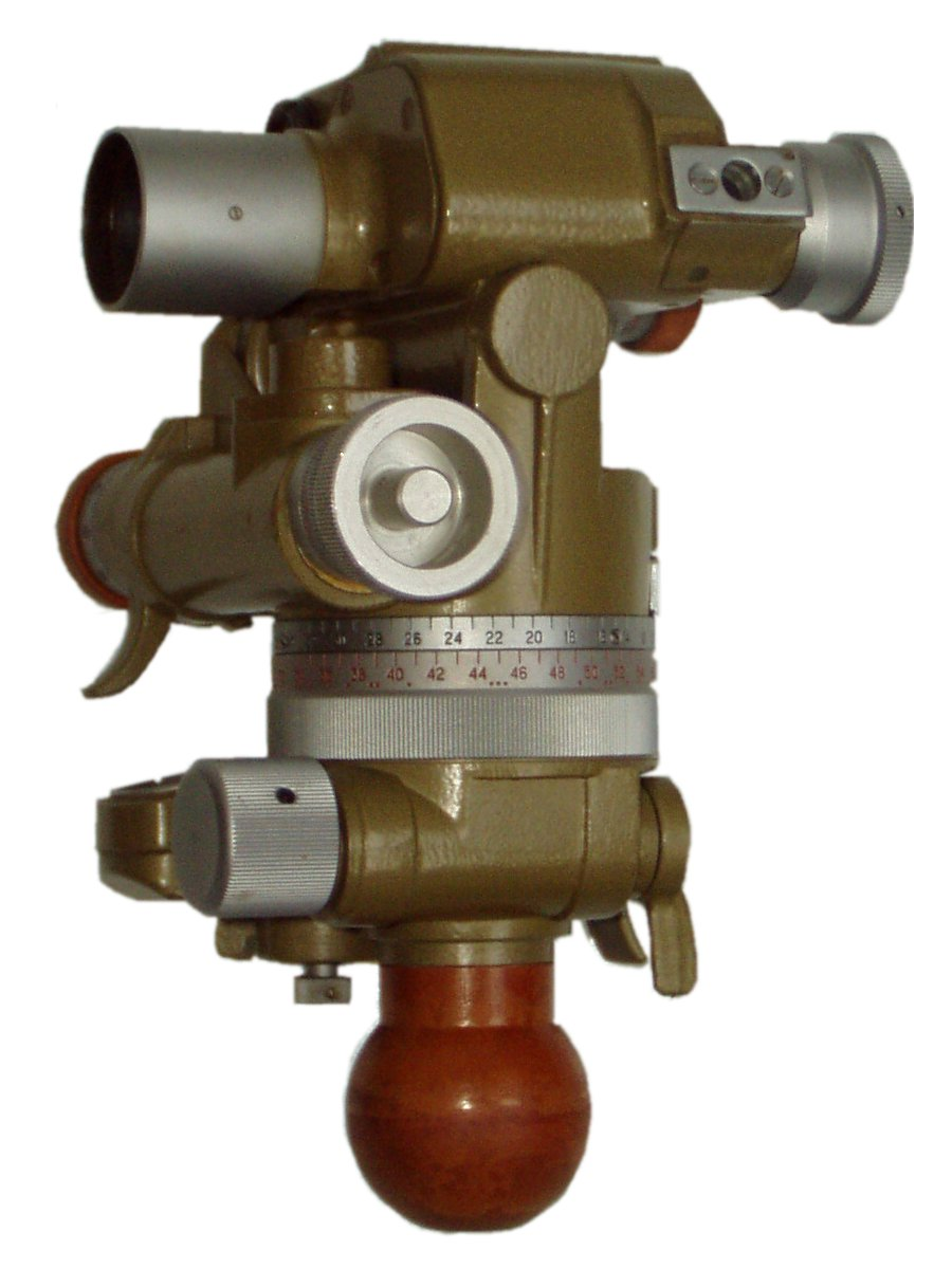 Artillerierichtkreis „PAB-2“, Zubehör für russische Radargeräte, etwa 1960 bis 1970